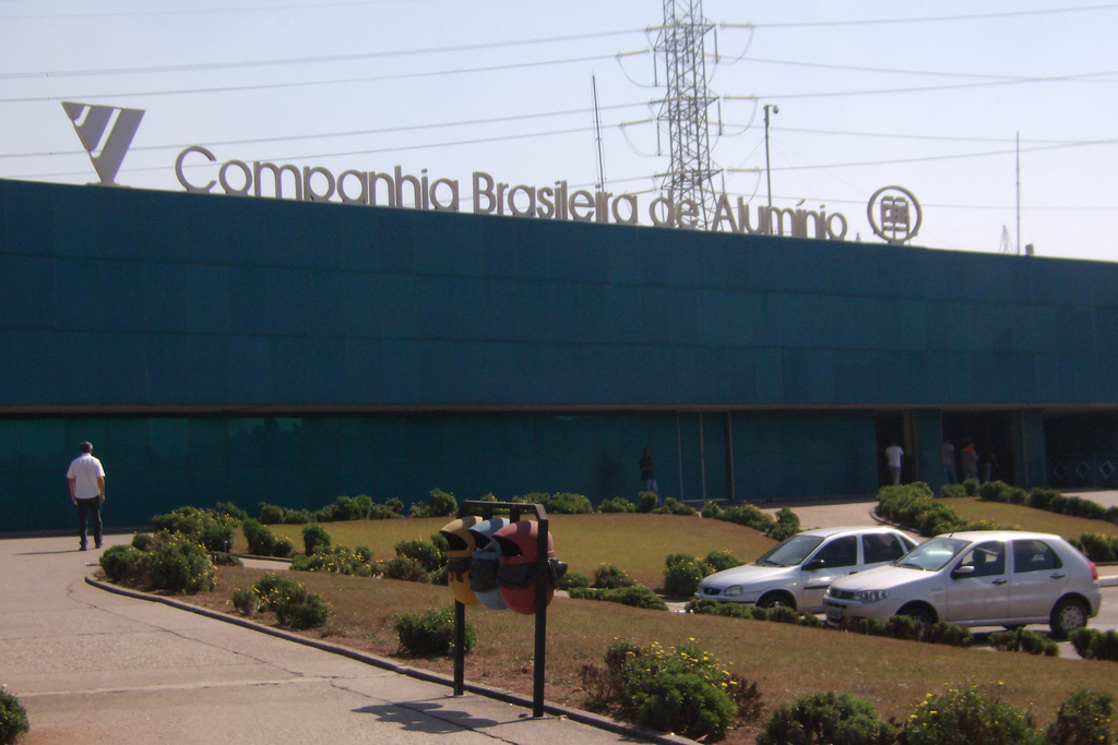 Portaria da Cia. Brasileira de AlumínioCia. Brasileira de Alumínio